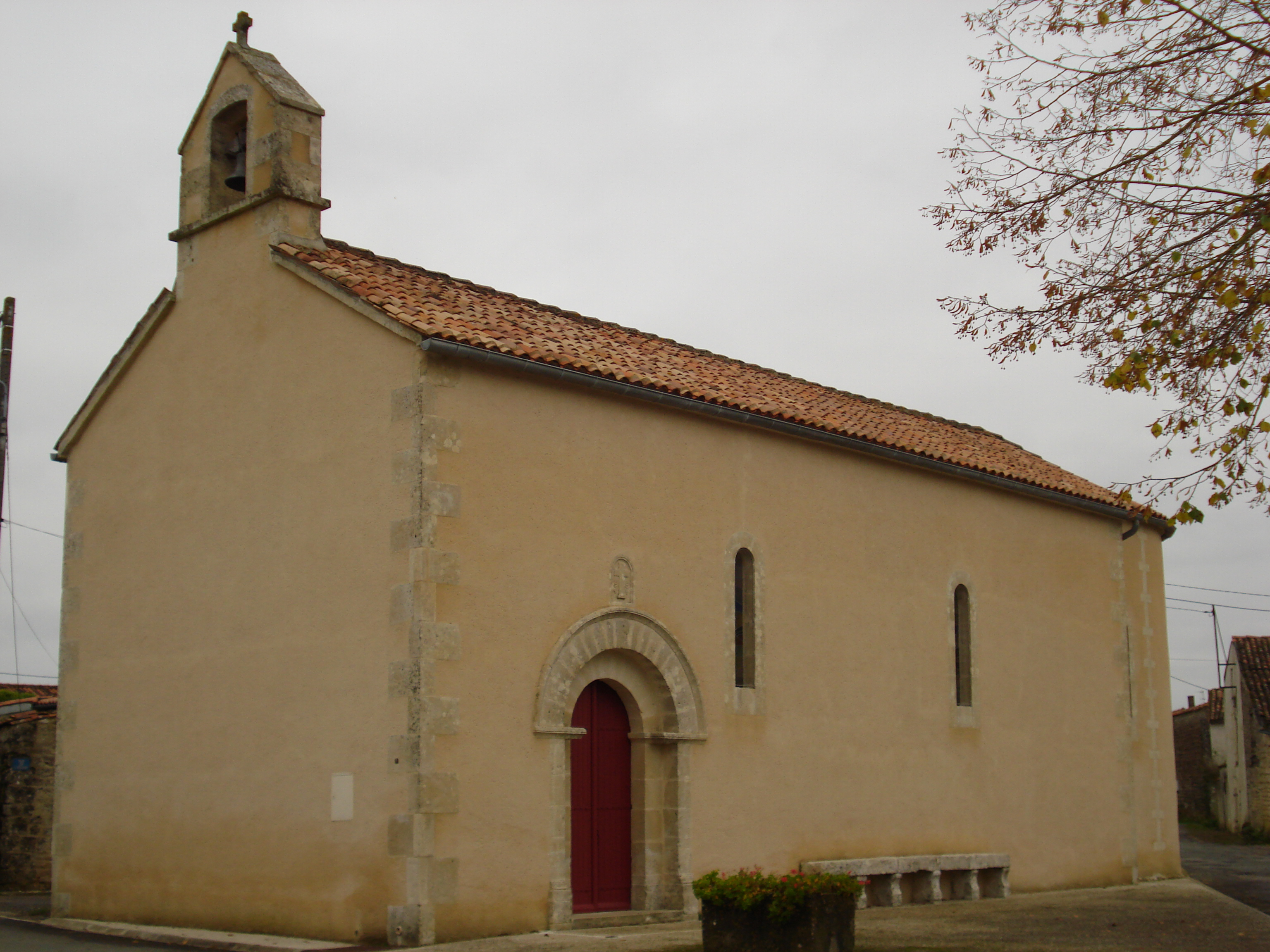 L'église de Villemorin